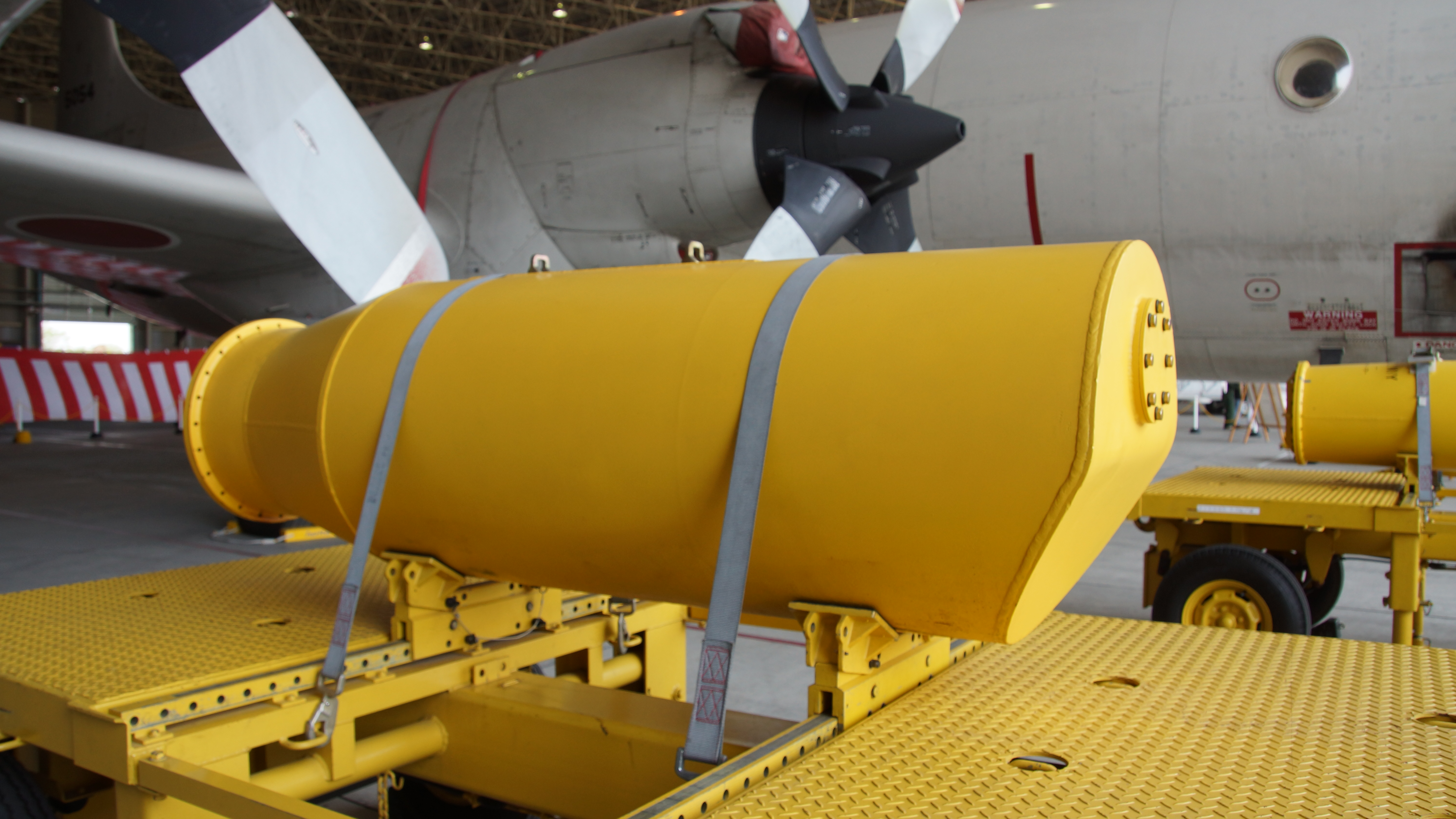 海上自衛隊 Mk55機雷 右前面。2017年4月30日 鹿屋航空基地にて。